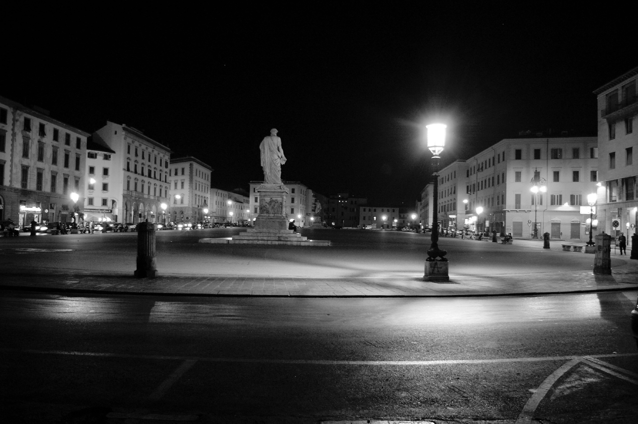 Livorno: veduta della Piazza della Repubblica, sul Fosso Reale, realizzata nella prima metà del XIX secolo su progetto di Luigi Bettarini.